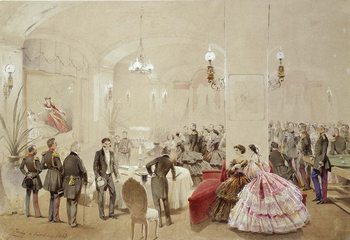 Александр II с придворными в Арсенальном зале Большого Гатчинского дворца Александр II с придворными в Арсенальном зале Гатчинского дворца. 1859 Внизу слева подпись и дата: Zichy a Gatchina 1859 Серая бумага; акварель, гуашь, местами белила, следы карандаша. 350 х 515 Инв. № ОР-40888 Литература: Алешина 1975, с. 199; Константин Николаевич 1994, с. 201 Внизу на монтировке надписи (авторские?): 24го Октября 1859 и перечень участников спектакля. В левой части рисунка, на сцене театра, княгиня А.Н. Трубецкая и княжна А.С. Долгорукова изображают “живую картину” на тему поэмы А.С. Пушкина “Бахчисарайский фонтан” с Заремой, приближающейся с кинжалом к Марии; в нижней части композиции, слева: графы В.Ф. Адлерберг, Ф.Ф. Берг, А.К. Рибопьер, барон П.К. Мейендорф; в глубине великие князья Владимир Александрович, Александр Александрович, музыкант Леви; князь А.М. Горчаков (опирается рукой о стол); по другую сторону стола фрейлина П.А. Бартенева. В центре композиции, в глубине: императрица Мария Александровна, наследник цесаревич Николай Александрович, Александр II, великий князь Константин Николаевич, великая княгиня Ольга Федоровна, великий князь Николай Николаевич, великая княгиня Александра Иосифовна, великий князь Михаил Николаевич, великая княгиня Александра Петровна, княгини С.А. Гагарина и М.А. Вяземская. Справа, в глубине, на втором плане: граф А.В. Адлерберг, А.В. Паткуль, граф П.К. Ферзен, Ф.Н. Тотлебен, граф С.Г. Строганов, барон Лоен, графиня Е.Н. Адлерберг, барон А.Е. Врангель, граф Е.П. Баранов, граф А.Н. Толстой, князь Ф.Н. Паскевич. Отмечая в своем дневнике все сколько-нибудь значительные или занимательные события, Константин Николаевич записал 24 октября: “…обед и вечер, как всегда, в Арсенале. Были живые картины. «Бахчисарайский фонтан»”.